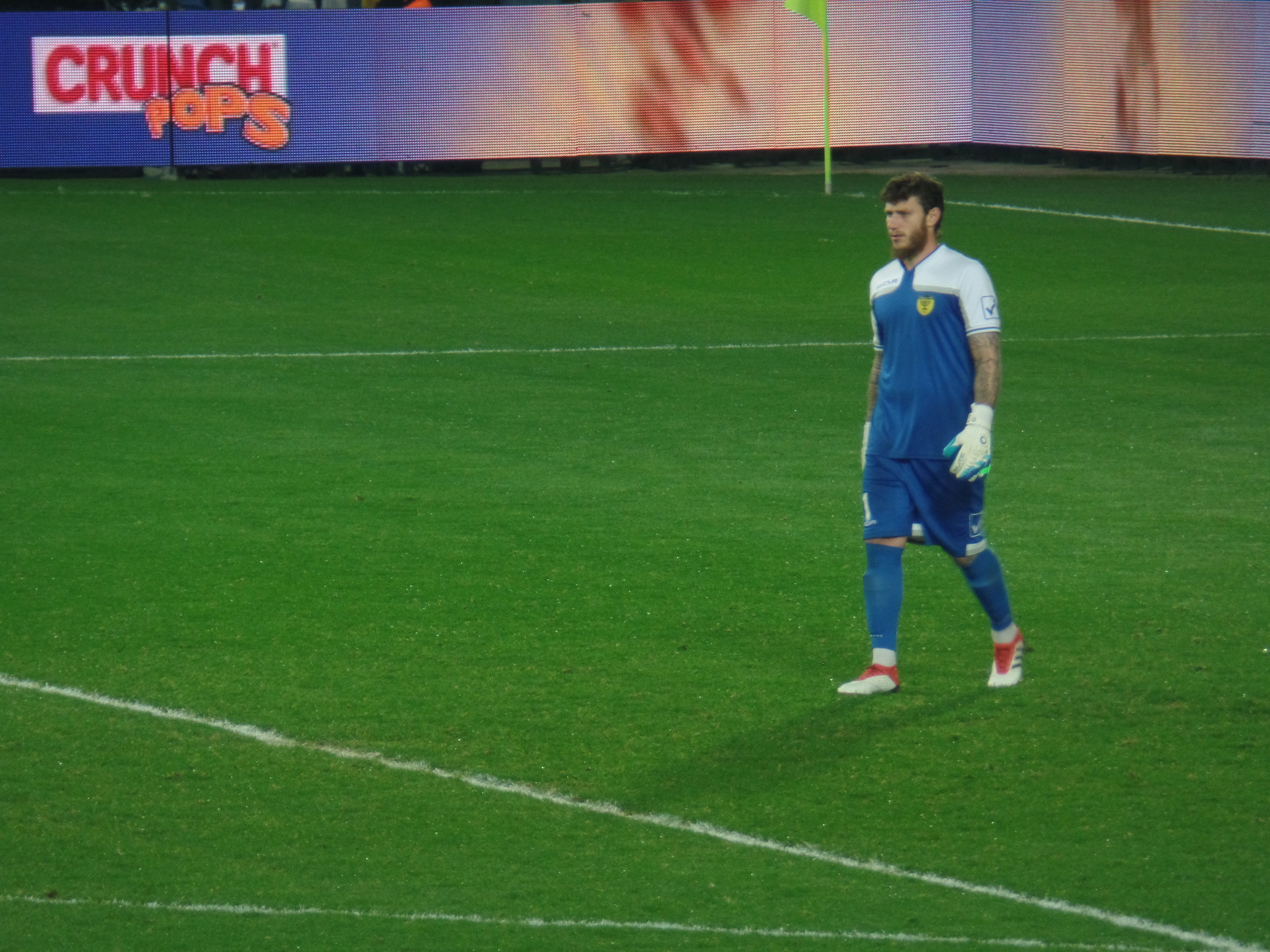 בוריס קליימן 2018